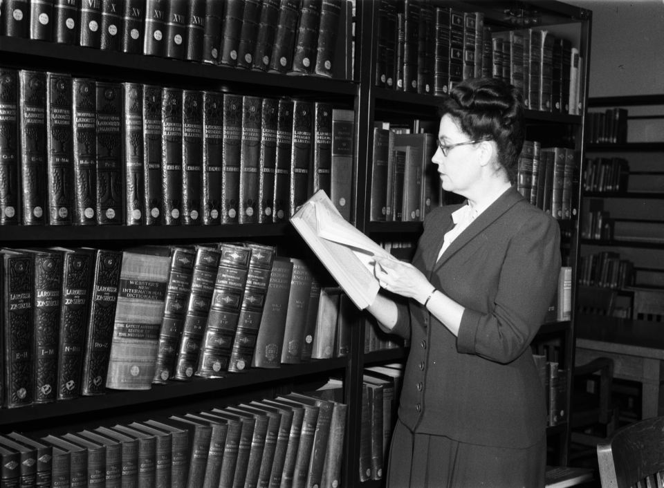 Hélène Grenier consulte un ouvrage de la bibliothèque où elle travaille.